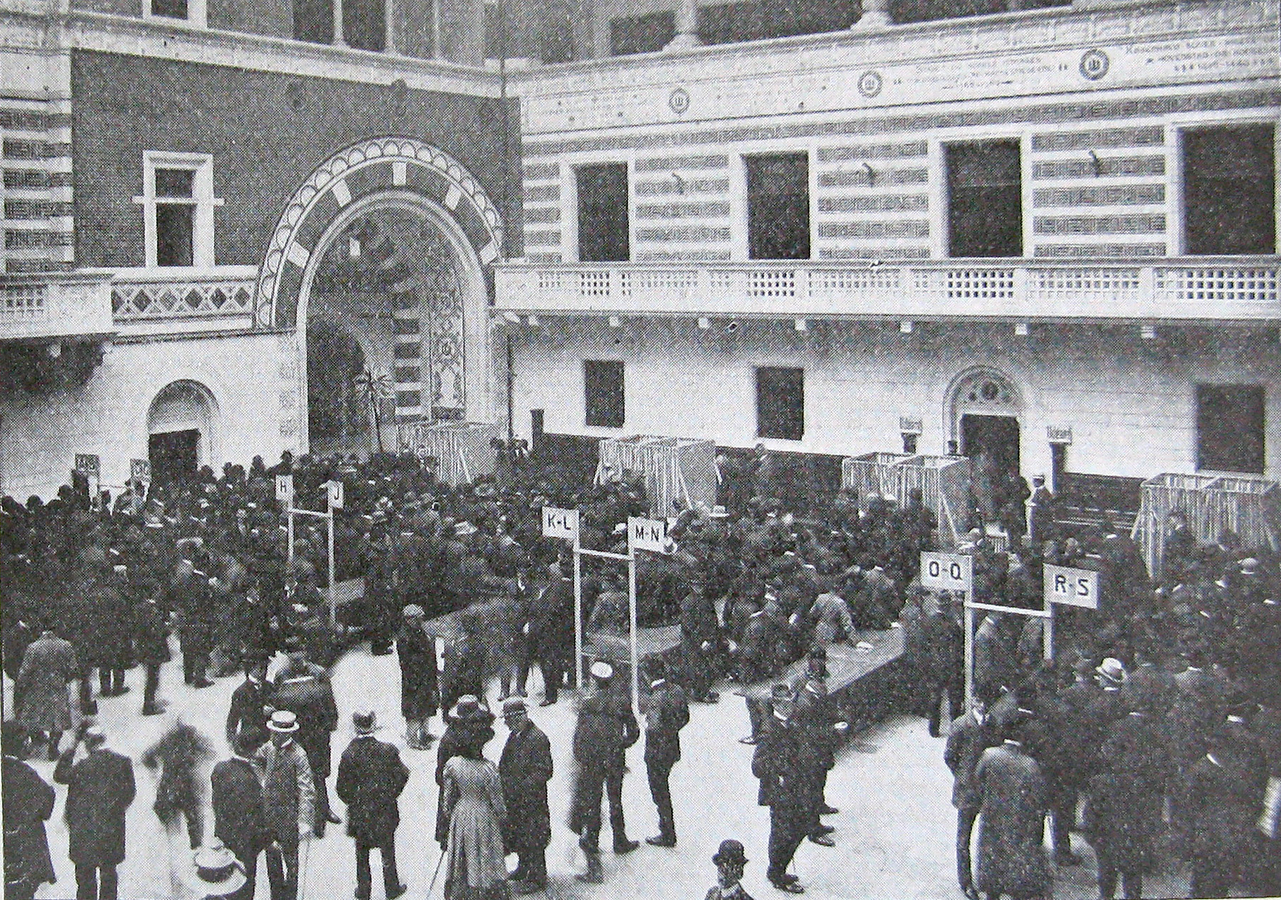 Folketingsvalg 1909 Afstemning på Københavns Rådhus